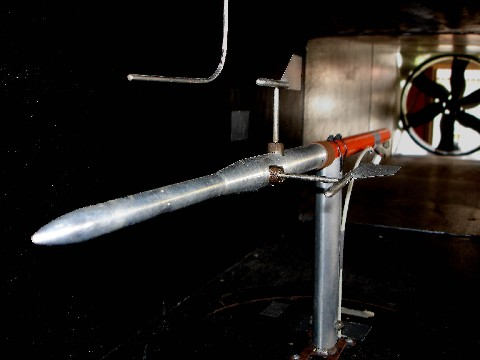 Tunel de Vento CEA WT-1